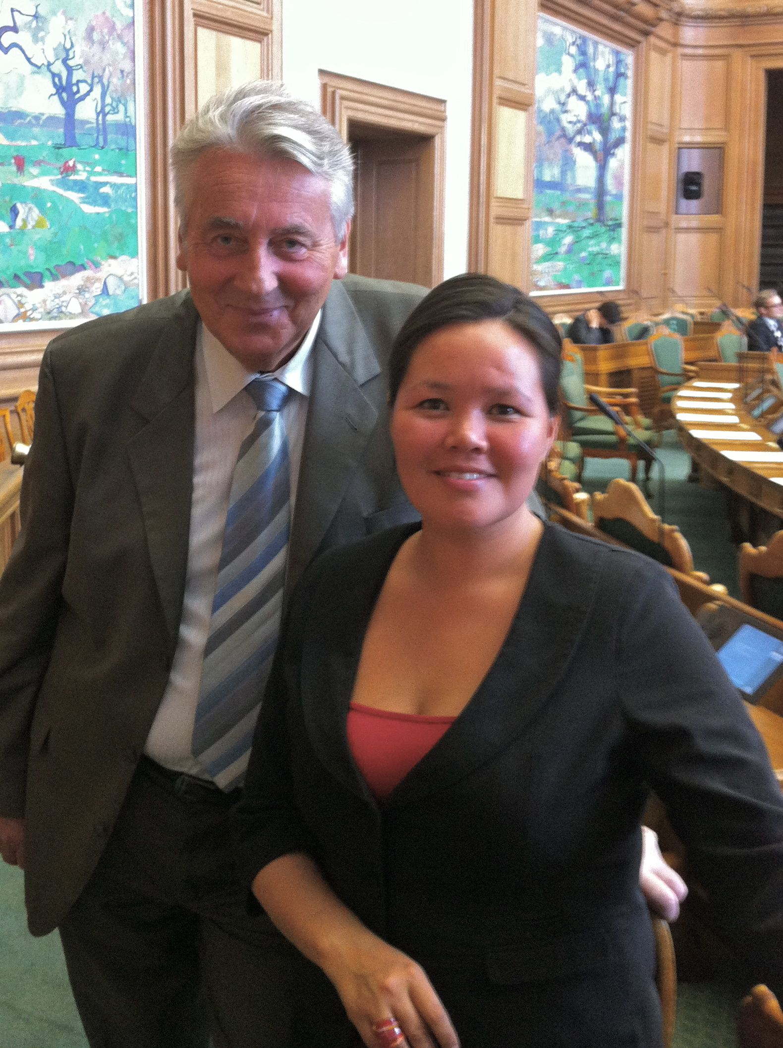 Foto fra folketingssalen: MF Edmund Joensen fra det færøske Sambandspartiet og MF Doris Jacobsen fra det grønlandske Siumut